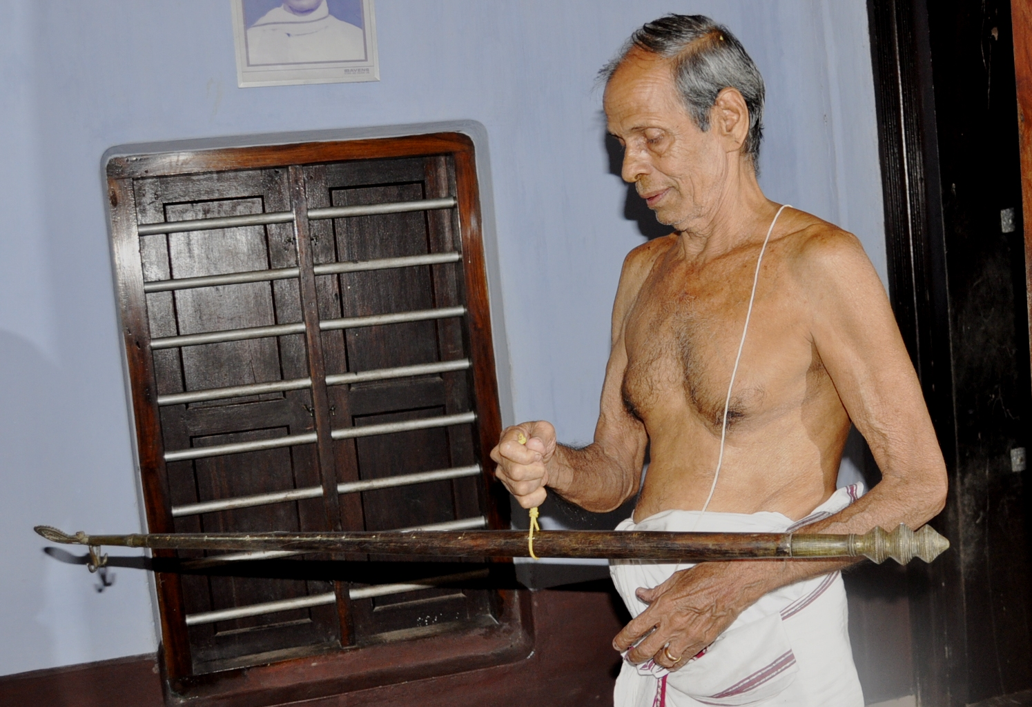 പണ്ടുകാലത്ത് നിലവിലുണ്ടായിരുന്ന ഒരു അളവുപകരണമാണ് വെള്ളിക്കോൽ